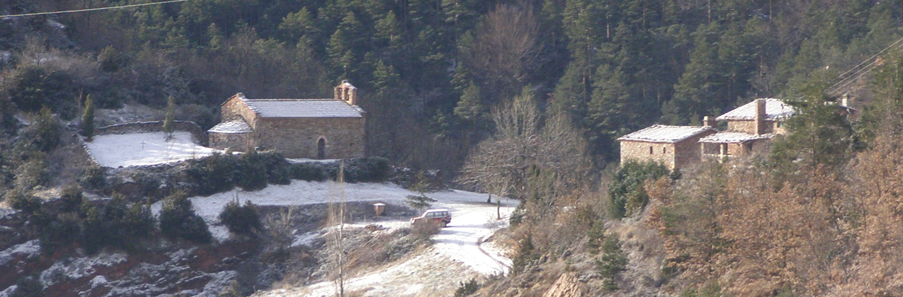 Església de Sant Andreu de Gréixer (Guardiola de Berguedà)